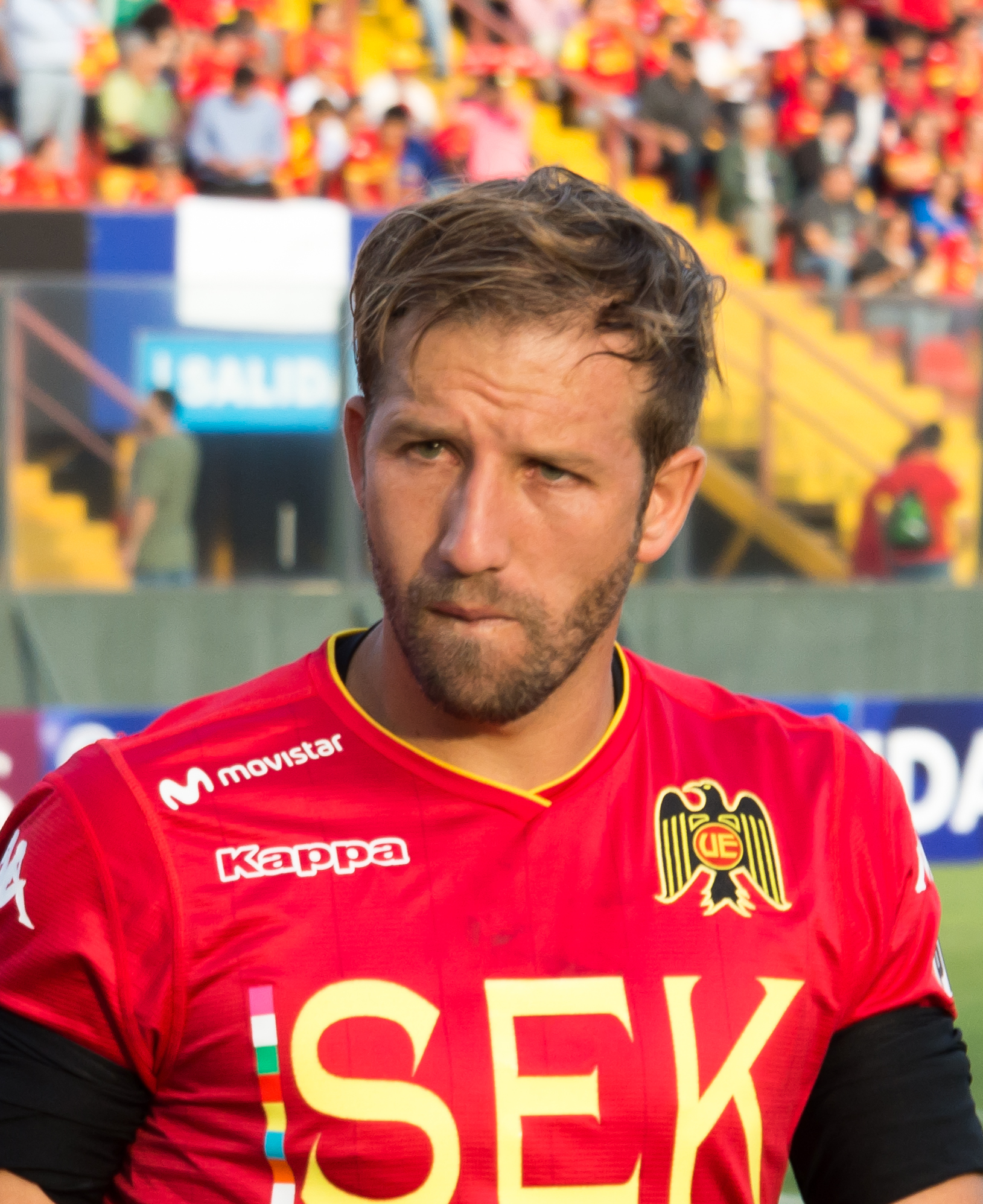 Felipe Seymour, Unión Española v Mushuc Runa, Estadio Santa Laura, Independencia, Santiago, Región Metropolitana, Chile.